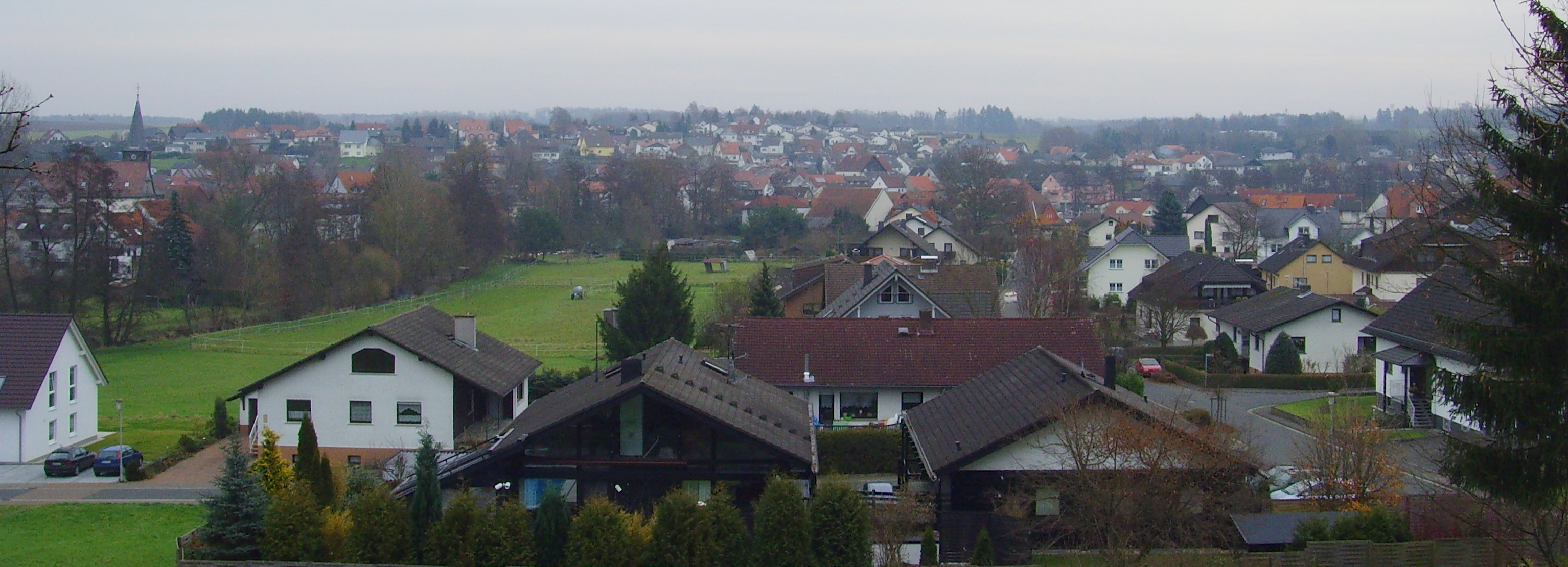 Blick vom Jungernweg auf Nieder-Ohmen